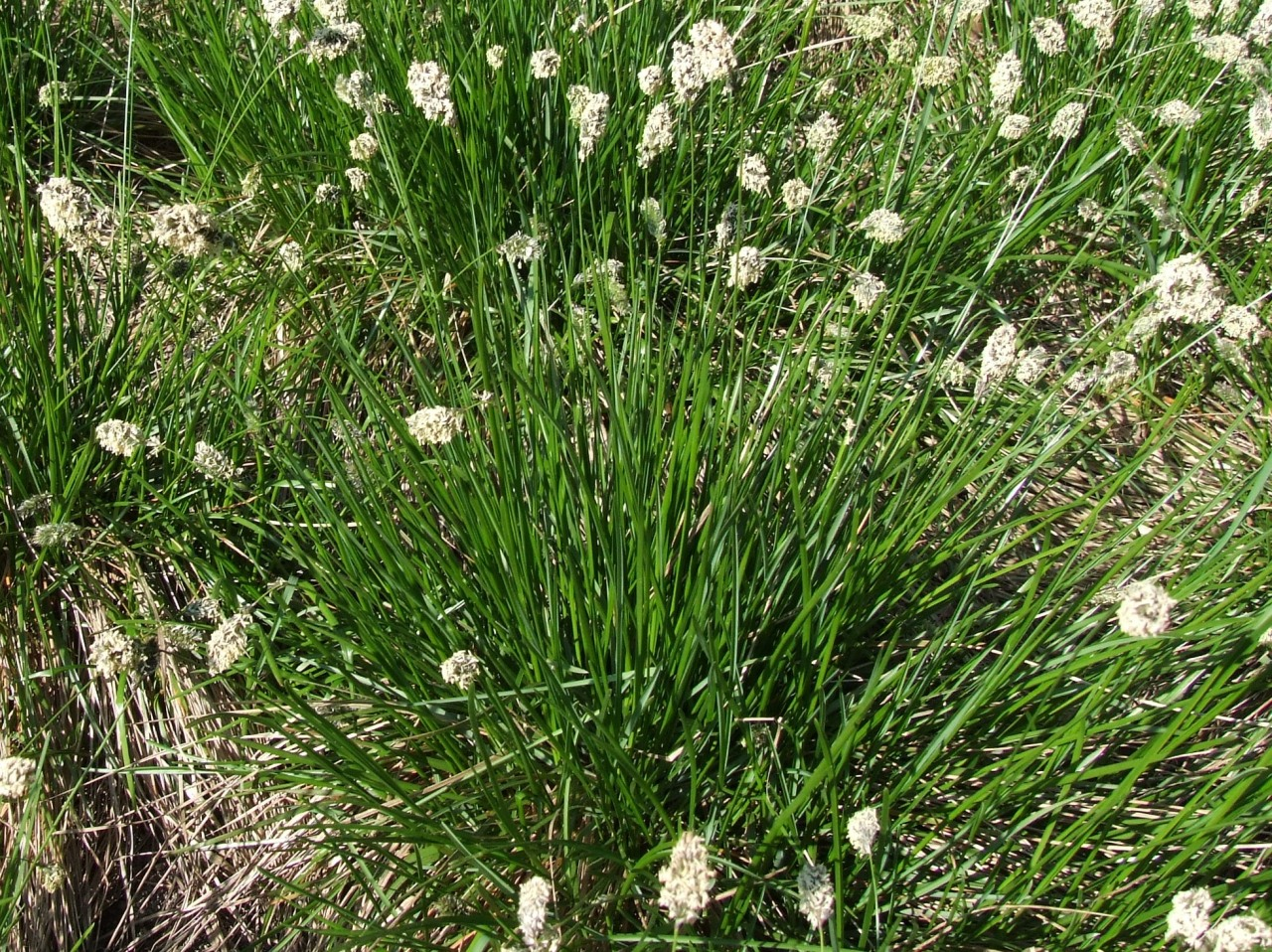 Sesleria_heufleriana